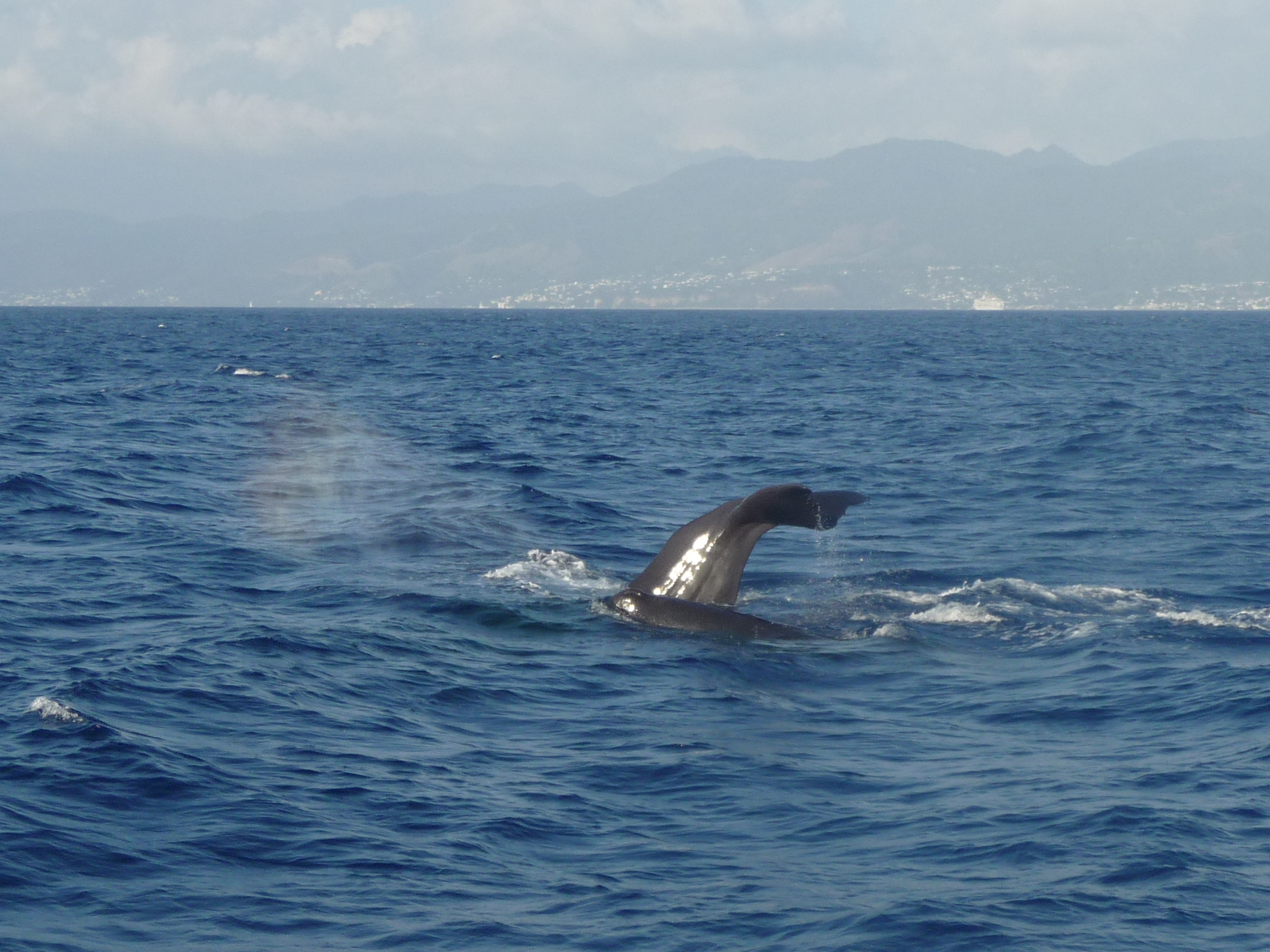 Baleine Ile de la Dominique